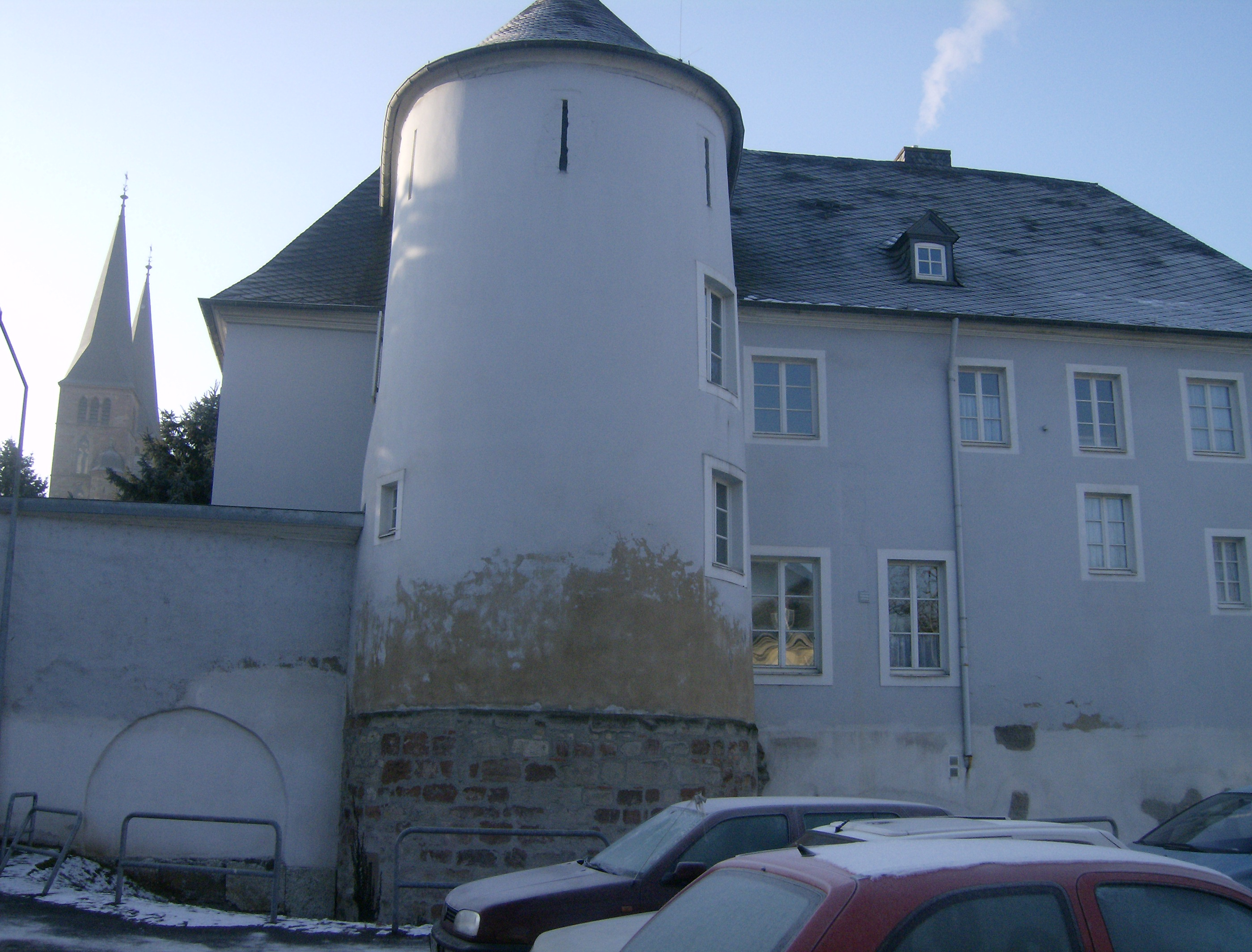 Kurie Eich oder „Zur (großen) Eiche“; barocker Walmdachbau, bezeichnet 1770; Ausstattung; romanisches Haus, spätes 11. oder frühes 12. Jahrhundert, mächtiger Halbturmanbau, wohl aus dem späten 12. Jahrhundert; in der Domberingmauer römische Sandsteinquader; spätromanische Kapelle, Dendro-Datierung 1199; Mansarddach-Gartenlaube; Wirtschafts- und Remisentrakt, eingeschossiger Mansarddachbau, im Anbau Torfahrt, um 1770